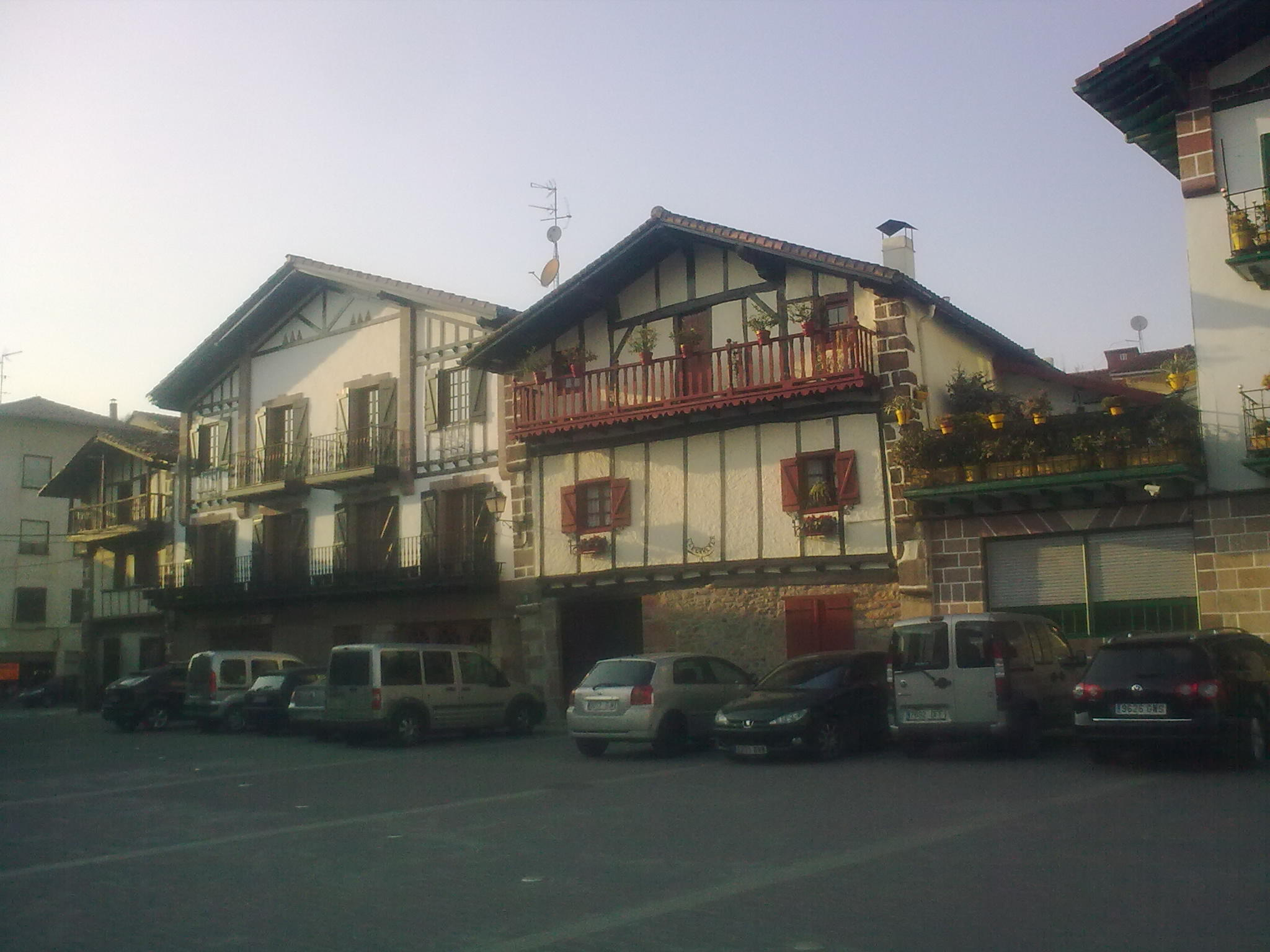 Jaun de Altzate plaza (Bera, Nafarroa)